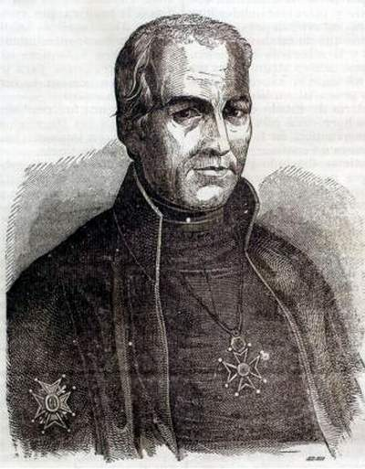 Retrato de Joaquín Lorenzo Villanueva Astengo (Játiva, España, 1757-Dublín, Irlanda, 1837) según grabado aparecido en el número 49 del Semanario Pintoresco Español el 3 de diciembre de 1848, p. 3.